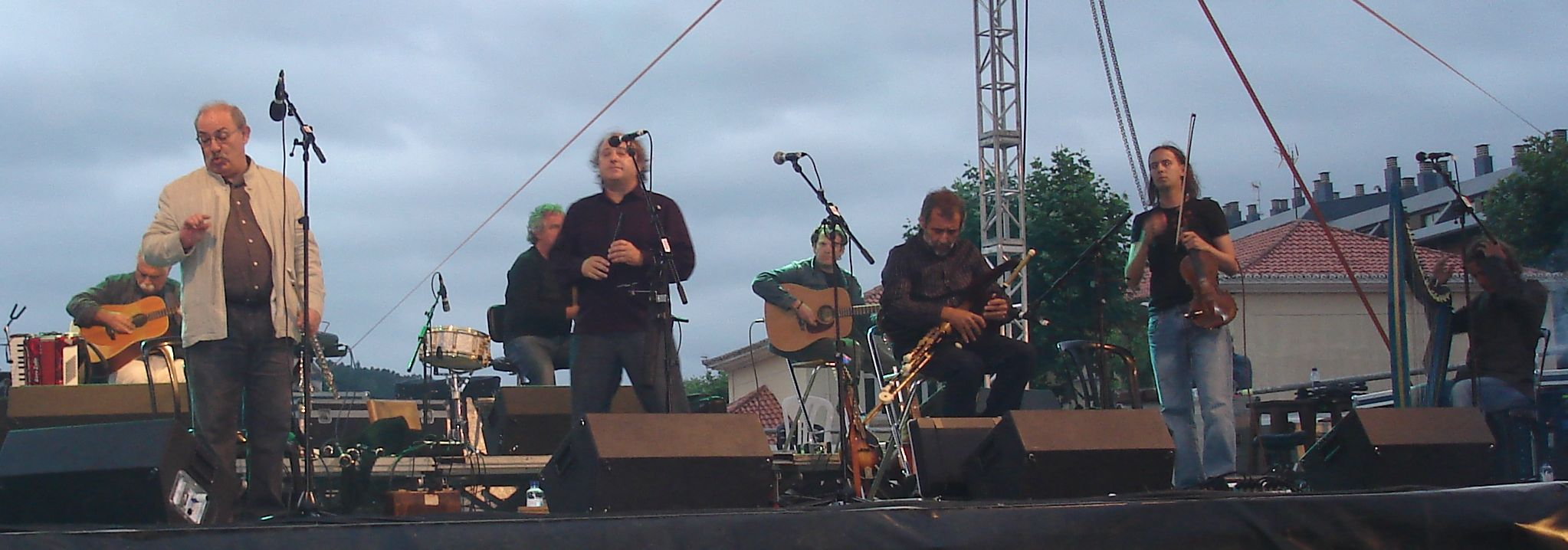 Milladoiro nas Festas de Narón o día 20 de xullo de 2008